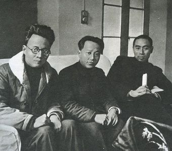 1938年，中共中央长江局领导博古、王明、周恩来（左起）在武汉